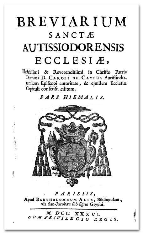 Bréviaire du diocèse d'Auxerre (1736)